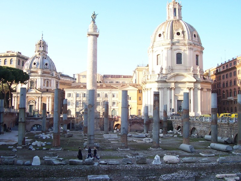 Roma - Foro di Traiano con l'omonima Colonna